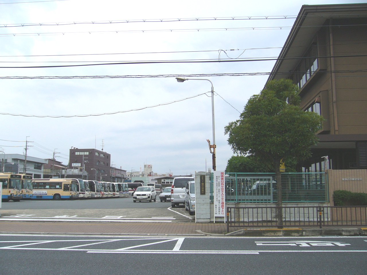 阪急バス本社（右の建物）、豊中営業所